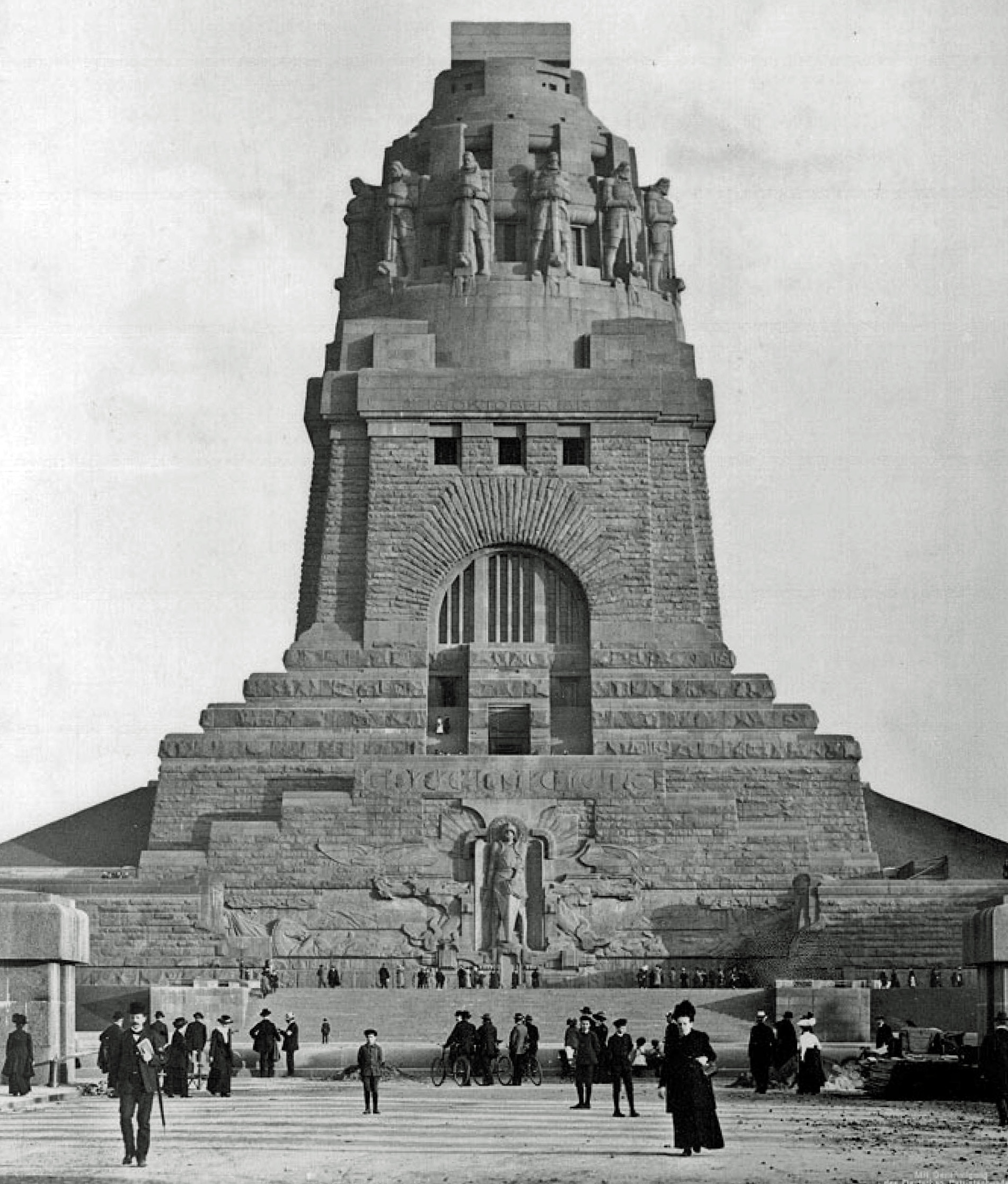 Das Völkerschlachtddenkmal 1913